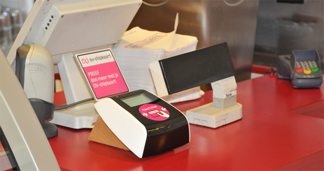 Een kaartlezer zoals bij de winkels in station Amersfoort werden gebruikt. Deze waren alleen beschikbaar voor ongeveer 400 proefpersonen uit de omgeving Amersfoort. Dit systeem heeft zich niet gehandhaafd en is opgevolgd door draadloos betalen met bankpasjes.